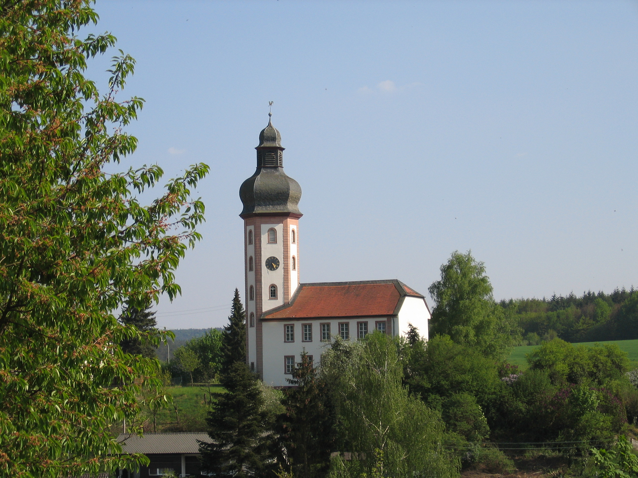 Schloßkirche Neuhemsbach, Nordseite